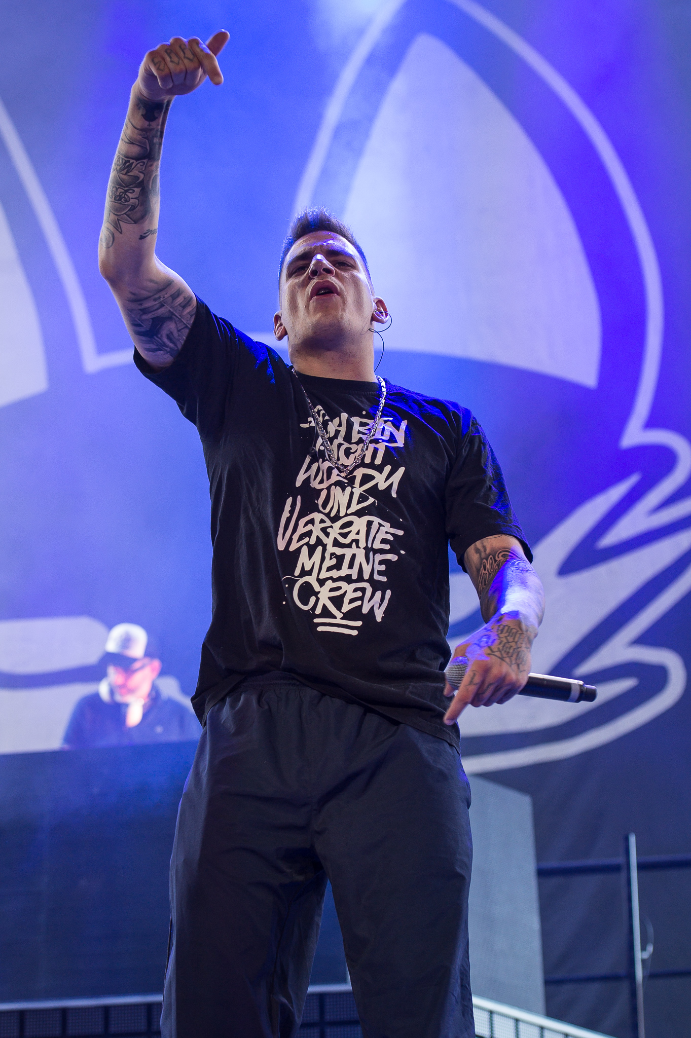 ARGO-Konzerte,Beck's Park Stage,Beginner,Gzuz,Jonas Kristoffer Klauß,Konzert,Livekonzert,Livemusik,Musik,RiP,Rock im Park 2017